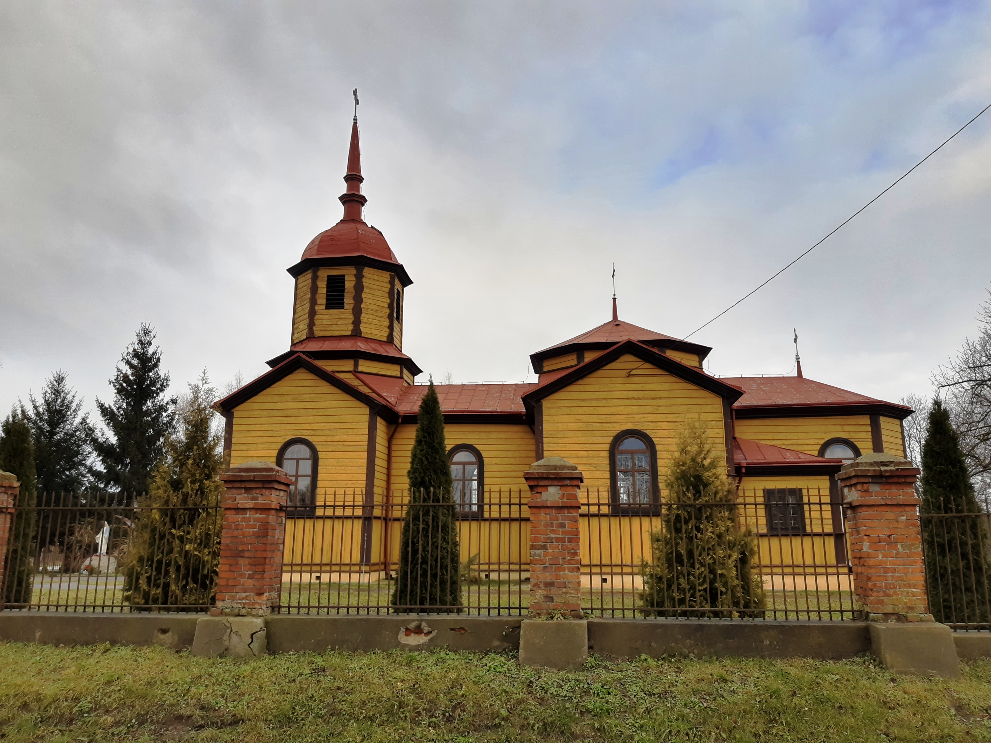 Żulin (gm. Rejowiec, pow. Chełm) - dawna cerkiew prawosławna, dzisiaj kościół rzym.-kat,. Matki Bożej Królowej Polski